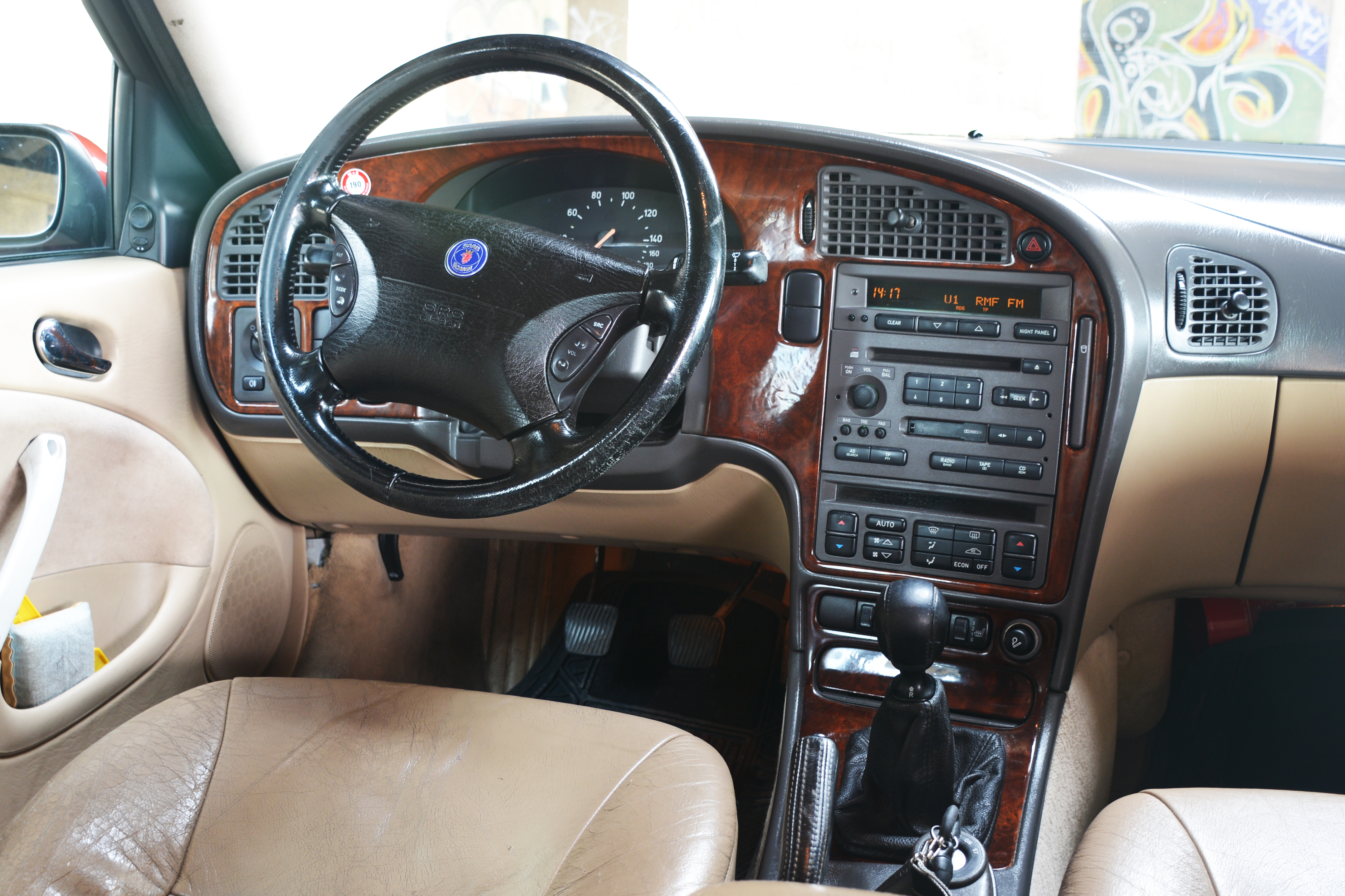 Saab 9-5 2.0 150 KM SE 1998